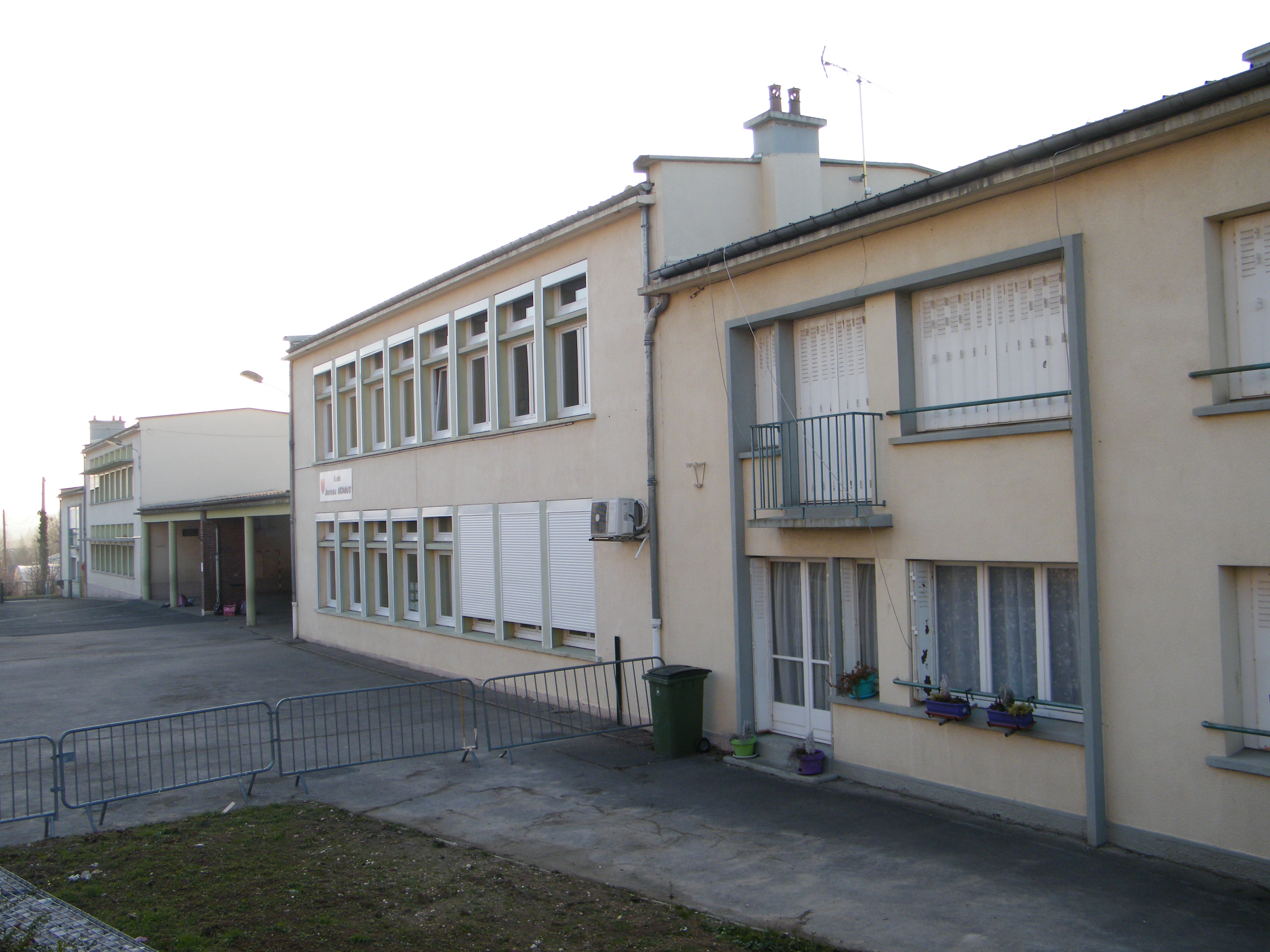 Rivery, Somme, fr, école Jeanne Arnaud.